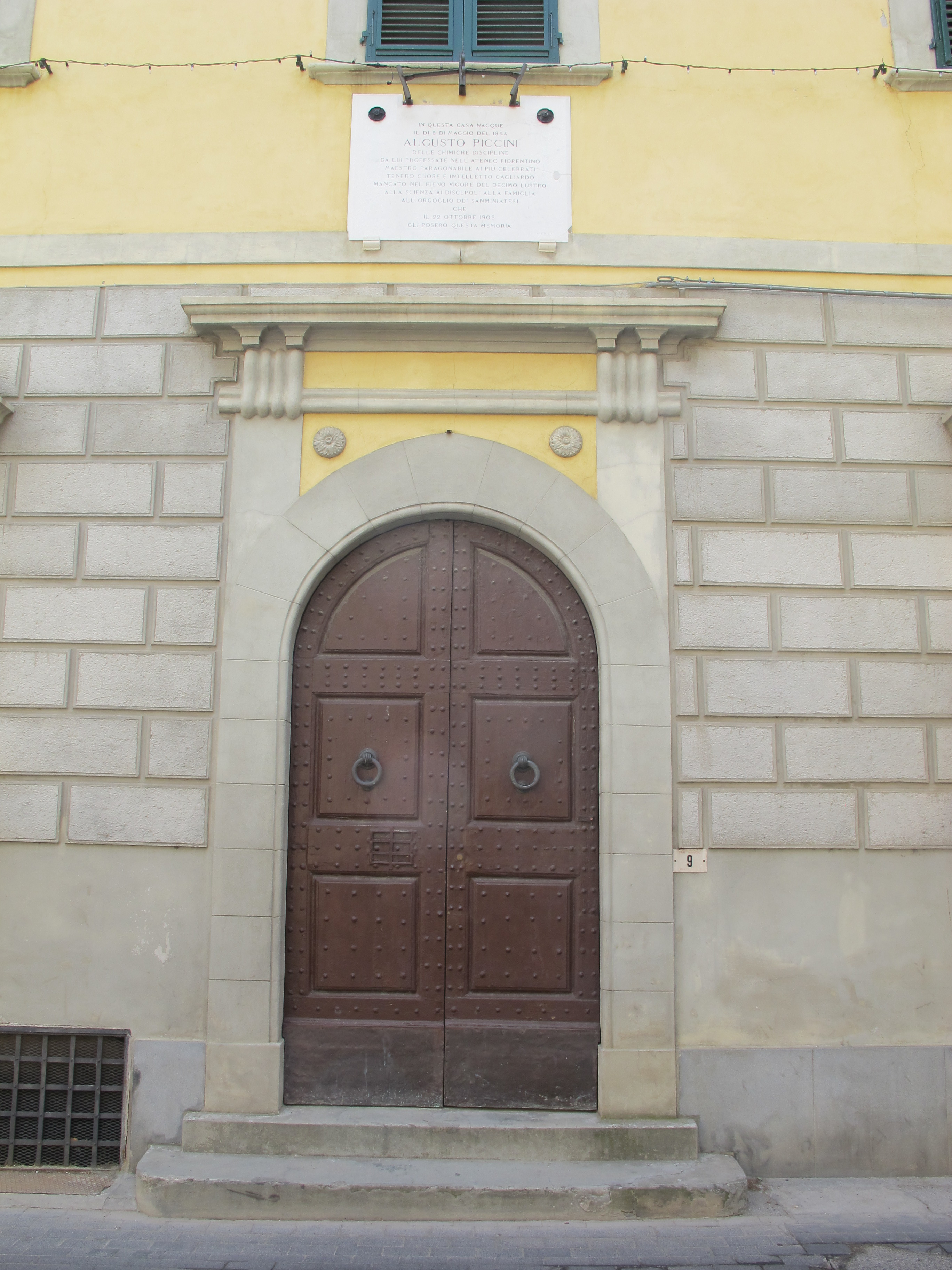 San miniato, casa di augusto piccini